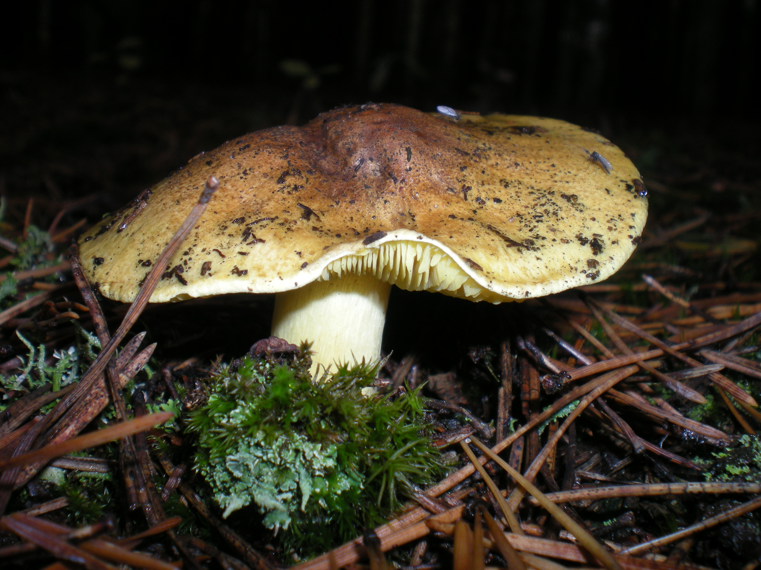 Gąska zielonka